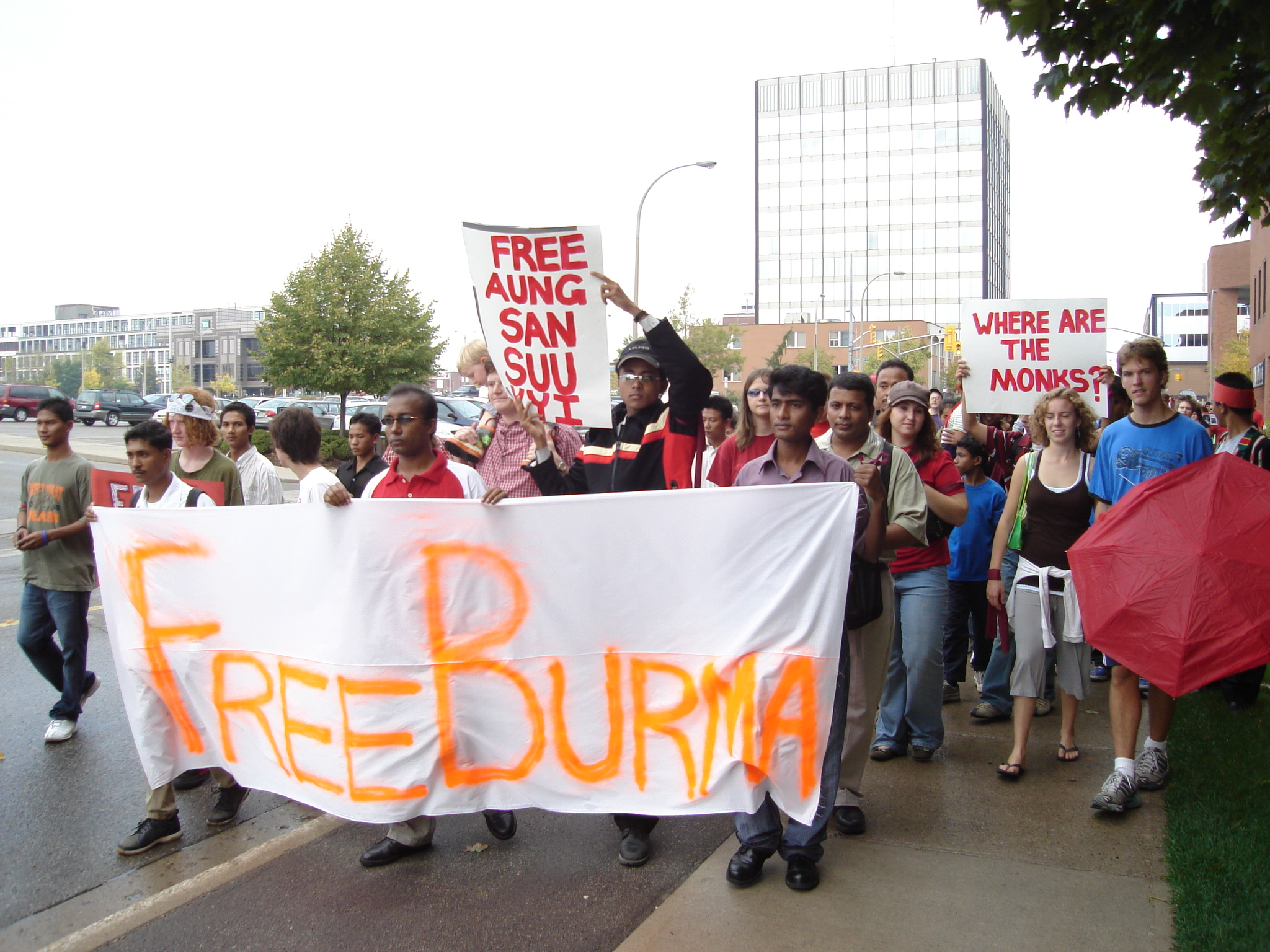 Wendy Nind, Protest for Burma in Kitchener, Ontario 2007